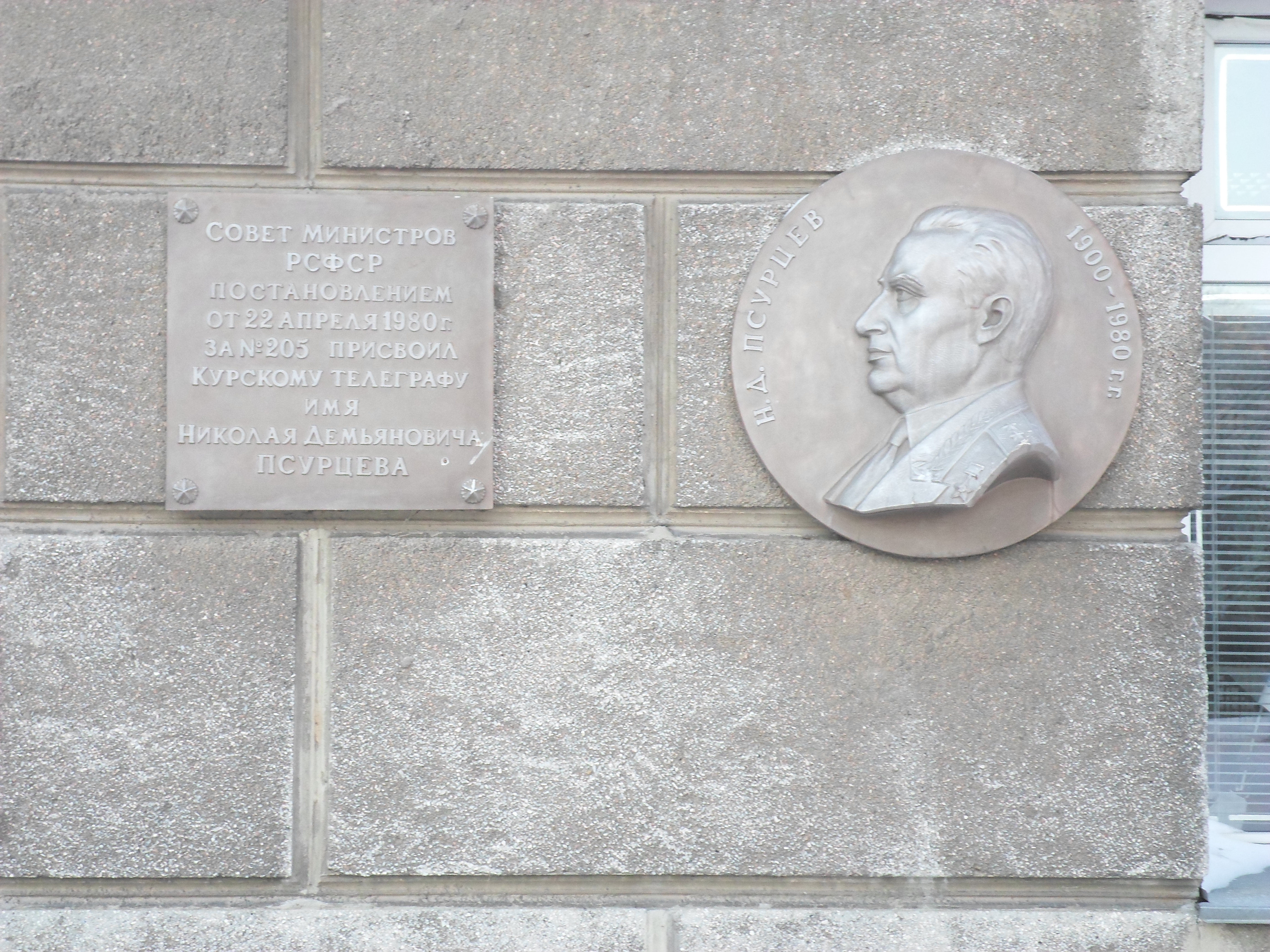 Мемориальная доска Н.Д. Псурцеву в Курске